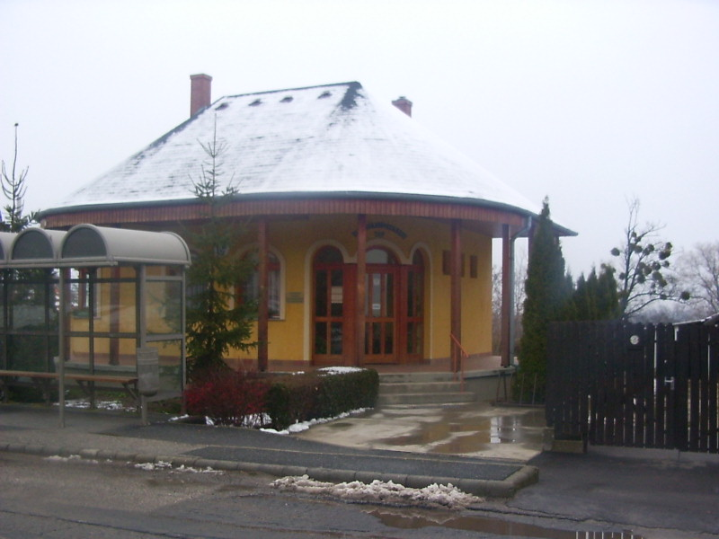 Tápi takarékszövetkezet épülete